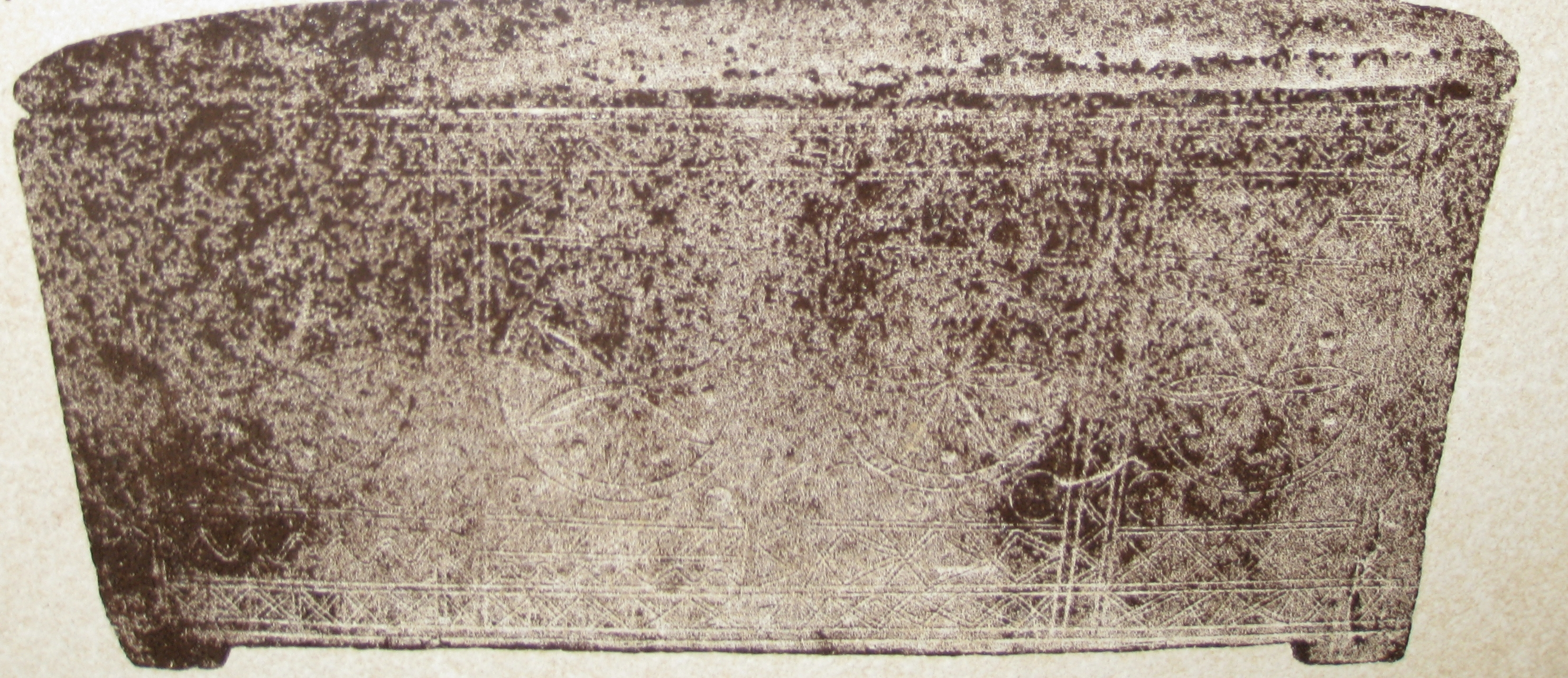 Mount Scopus הר הצופים